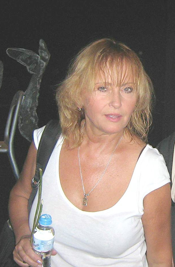 Dorota Pomykała, aktorka.